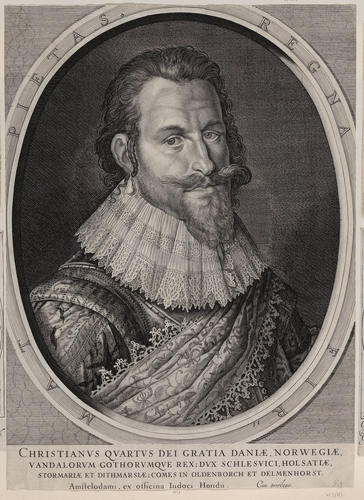 Cristian IV. von Dänemark